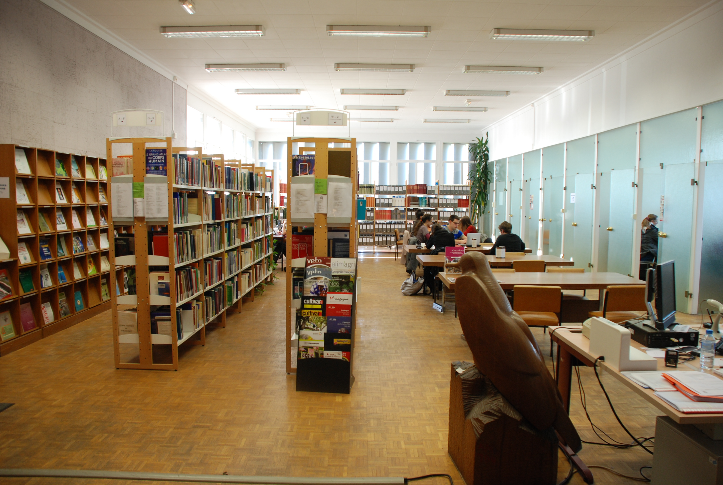 École nationale vétérinaire de Toulouse : salle de lecture de la bibliothèque